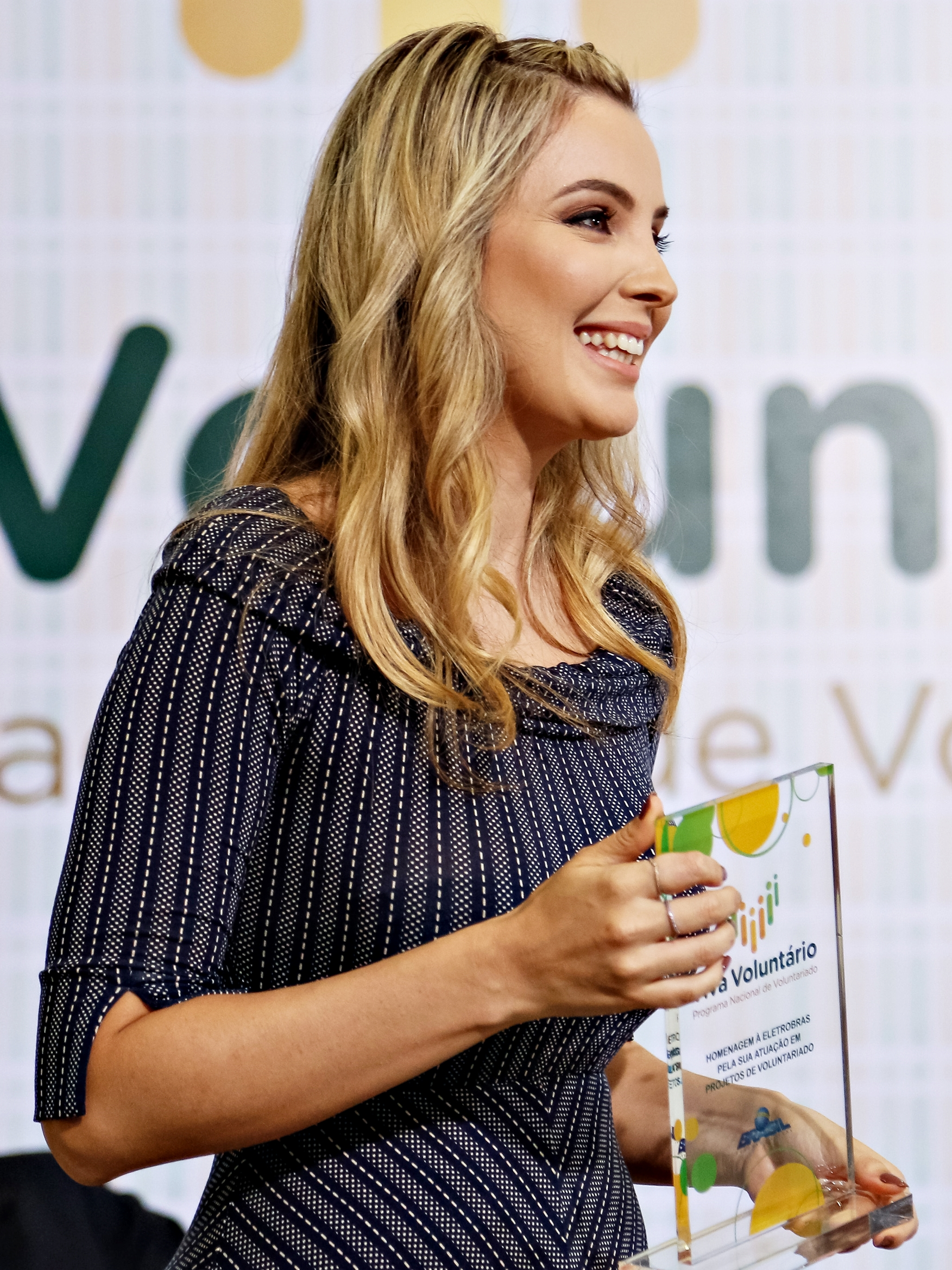 28/08/2017 - Cerimônia de Lançamento do Programa Nacional de Voluntariado (Brasília - DF, 28/08/2017) Cerimônia de Lançamento do Programa Nacional de Voluntariado.